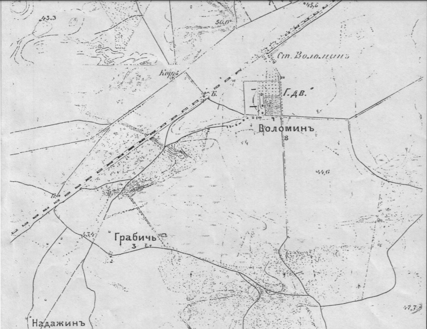 Mapa topograficzna rejonu warszawskiego z 1875 r., fragment, z naniesonym majątkiem Wołomin